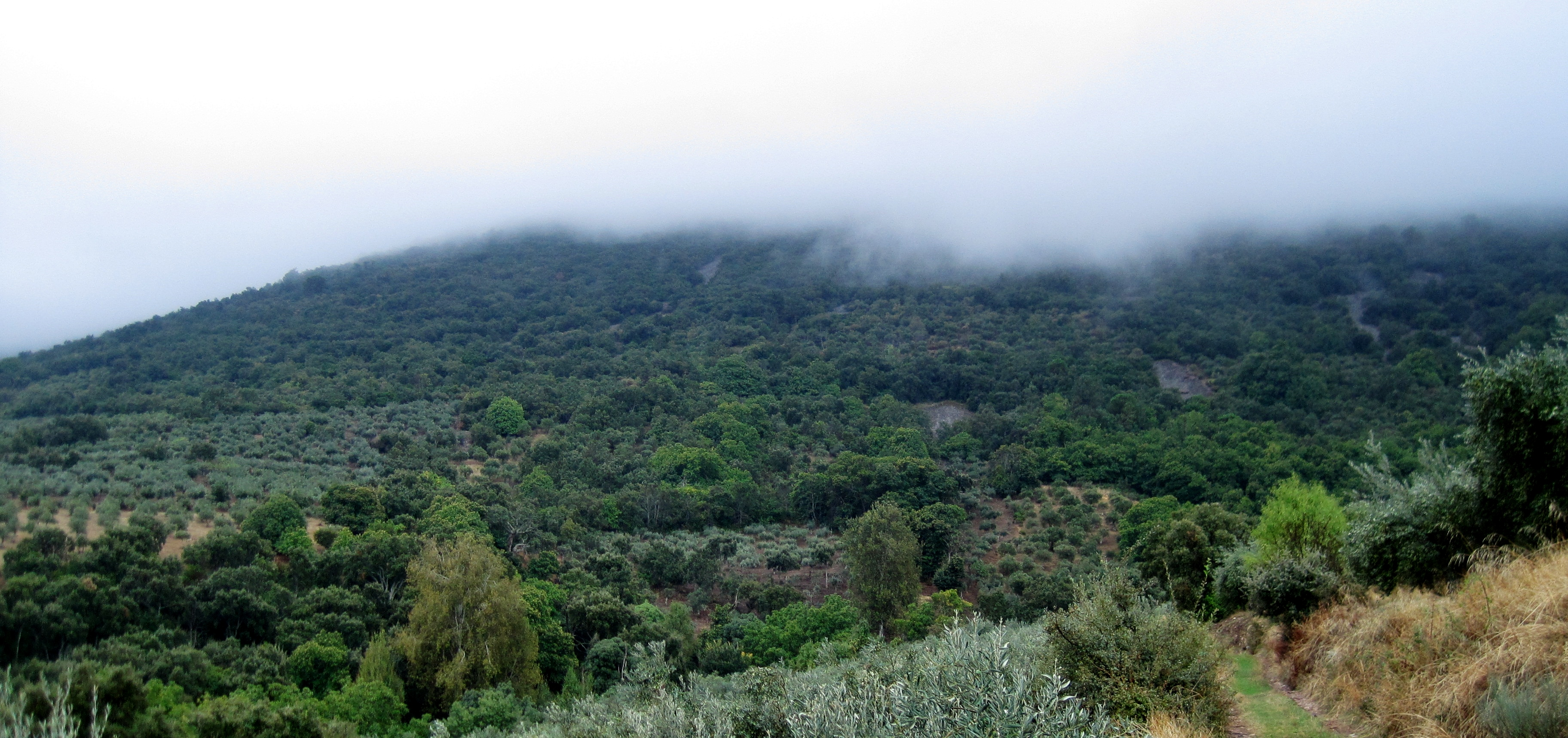 Sierra de Siruela This is a photography of a Site of Community Importance in Spain with the ID: ES4310042. Natura2000 entry, EEA entry